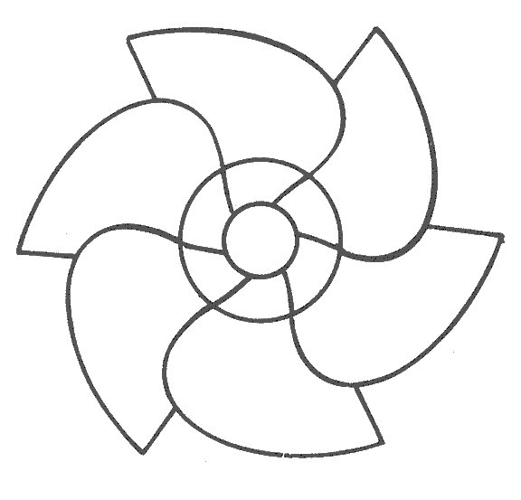 Sakia wheel.